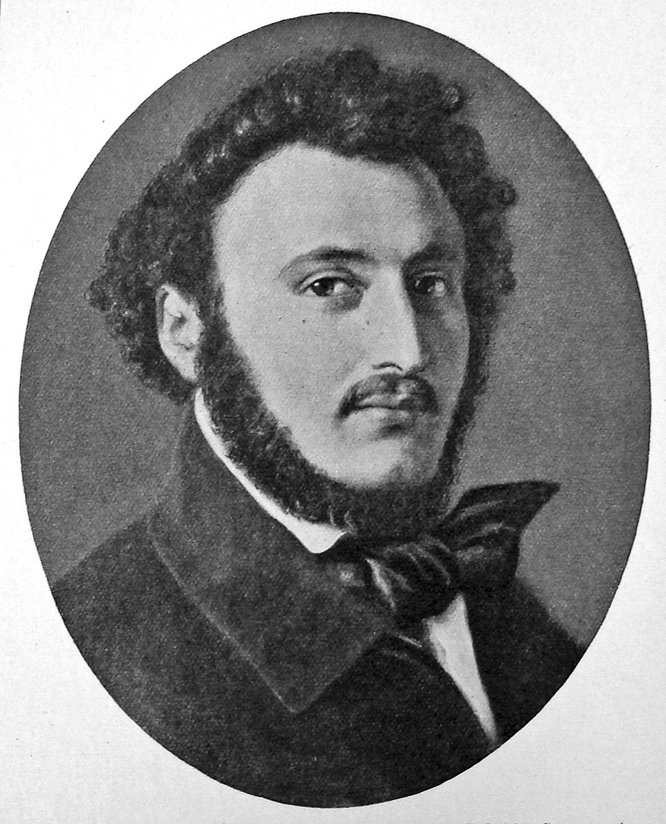 Meïr Aron Goldschmidt (1819-1887). Dansk-jødisk forfatter, satiriker og politisk iagttager.